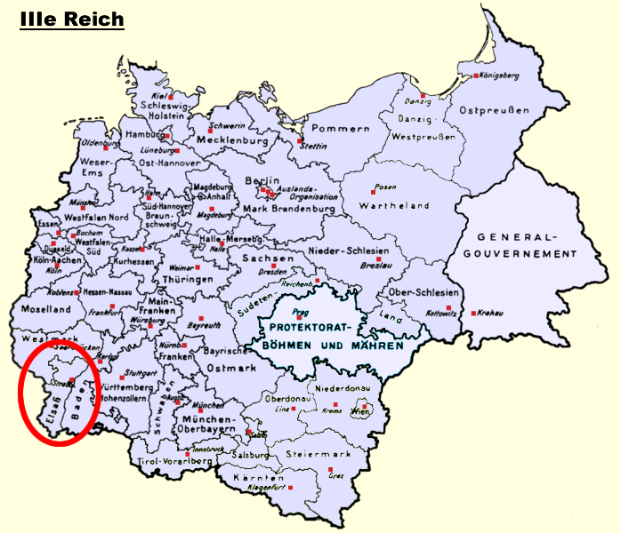 Carte représentant l'Alsace annexée par l'Allemagne nazie